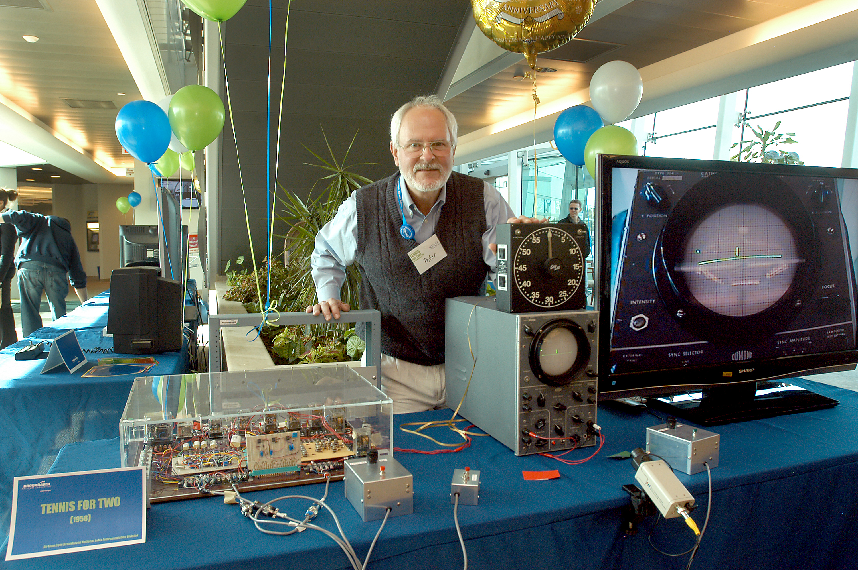 Tennis For Two ricreato nel 2008 in occasione del suo 50° anniversario